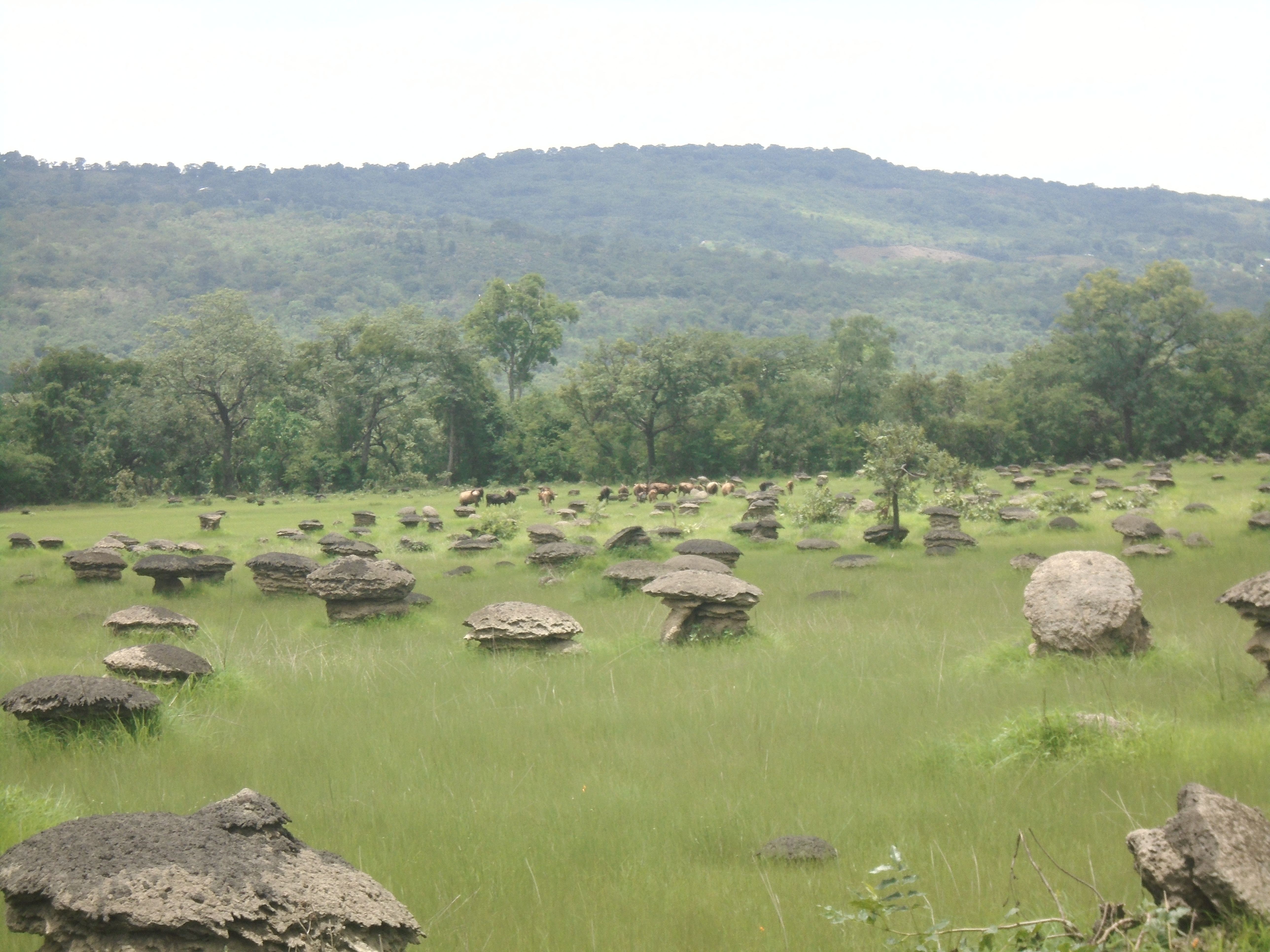 des petites termites dans la savane foutanienne